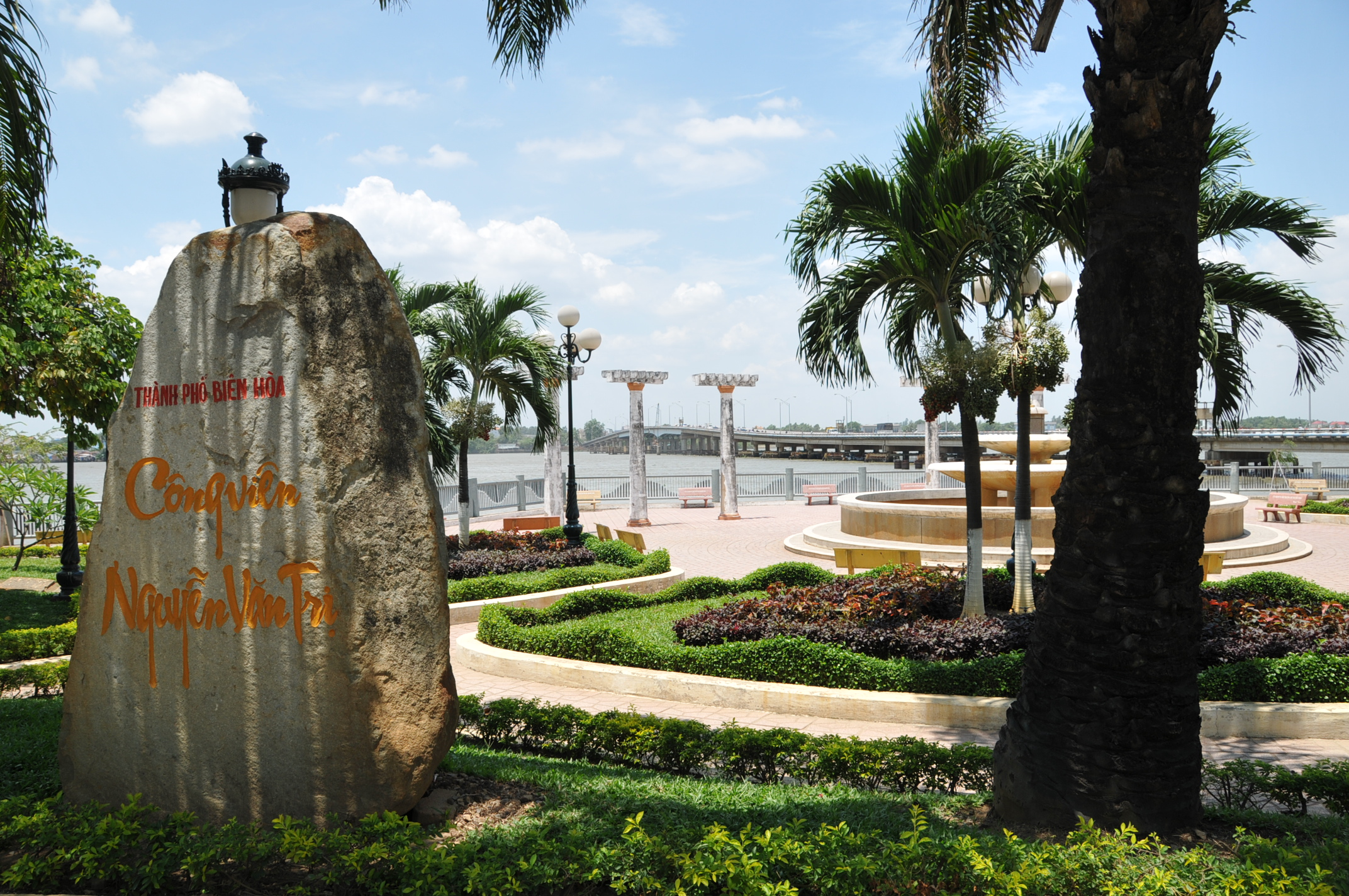 Công viên Nguyễn Văn Trị